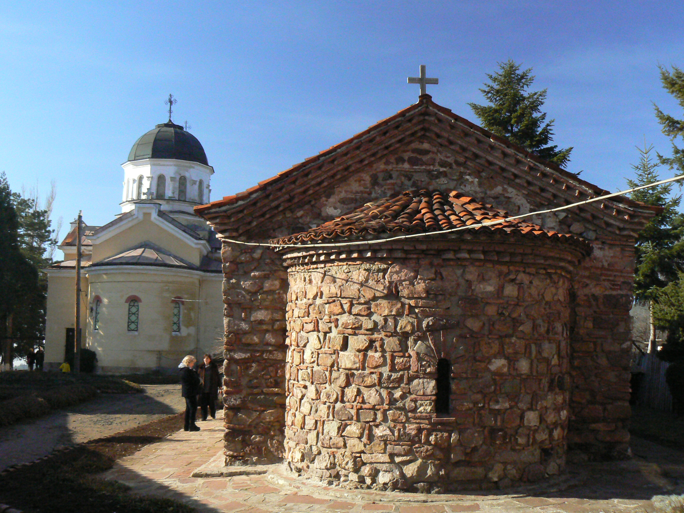 Кремиковски манастир край София, България. Kremikovski monastery, near Sofia, Bulgaria.